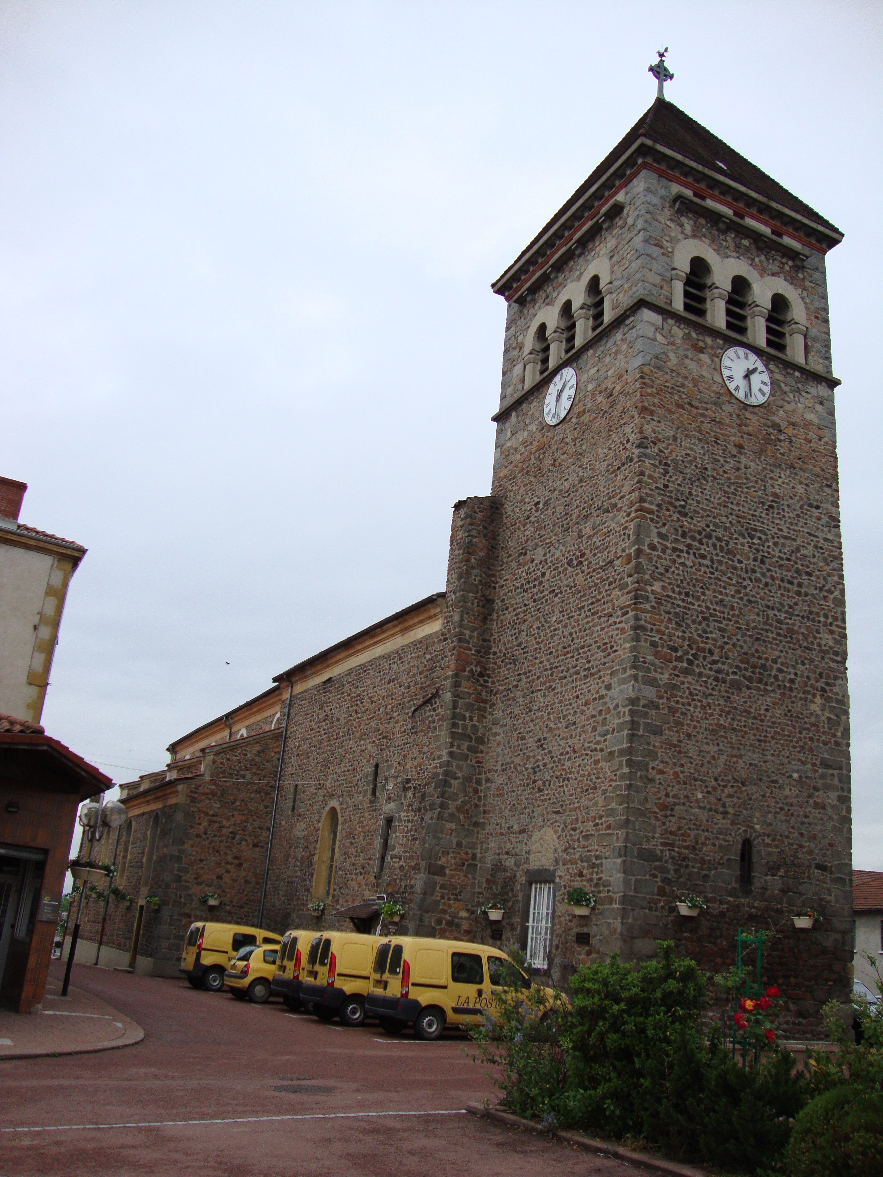 Balbigny (Loire, Fr) église coté tour.